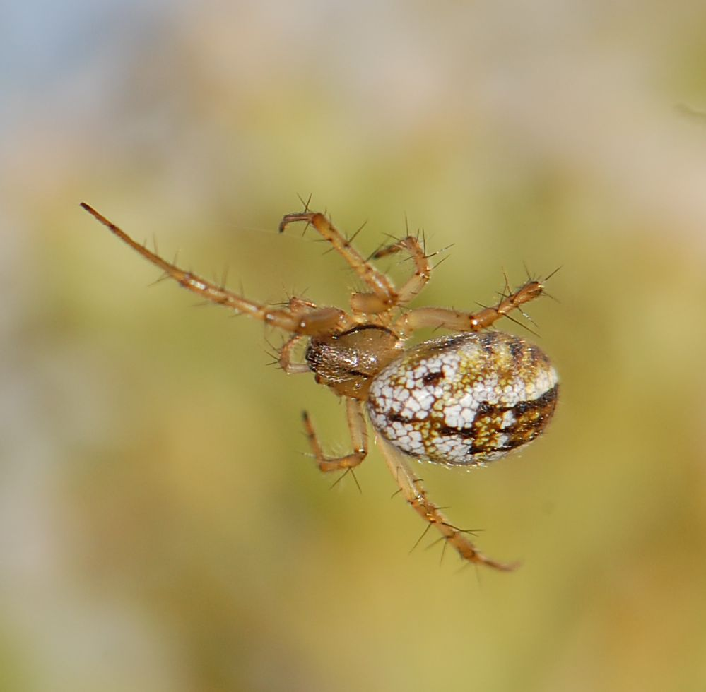 Mangora acalypha, Berlin-Pankow